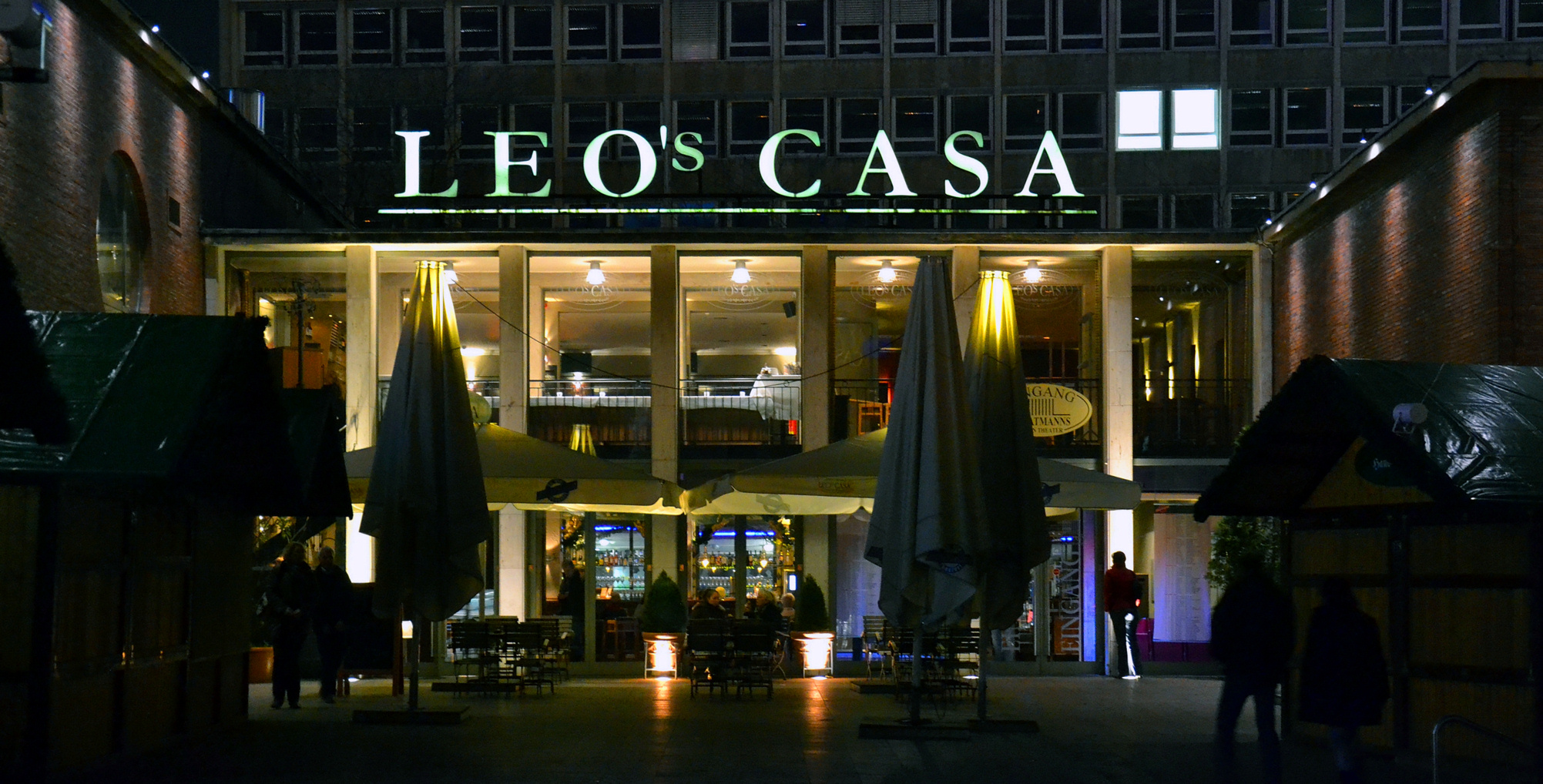 Stratmanns Theater und Restaurant Leo´s Casa im Amerikahaus Ruhr in Essen, Kennedyplatz